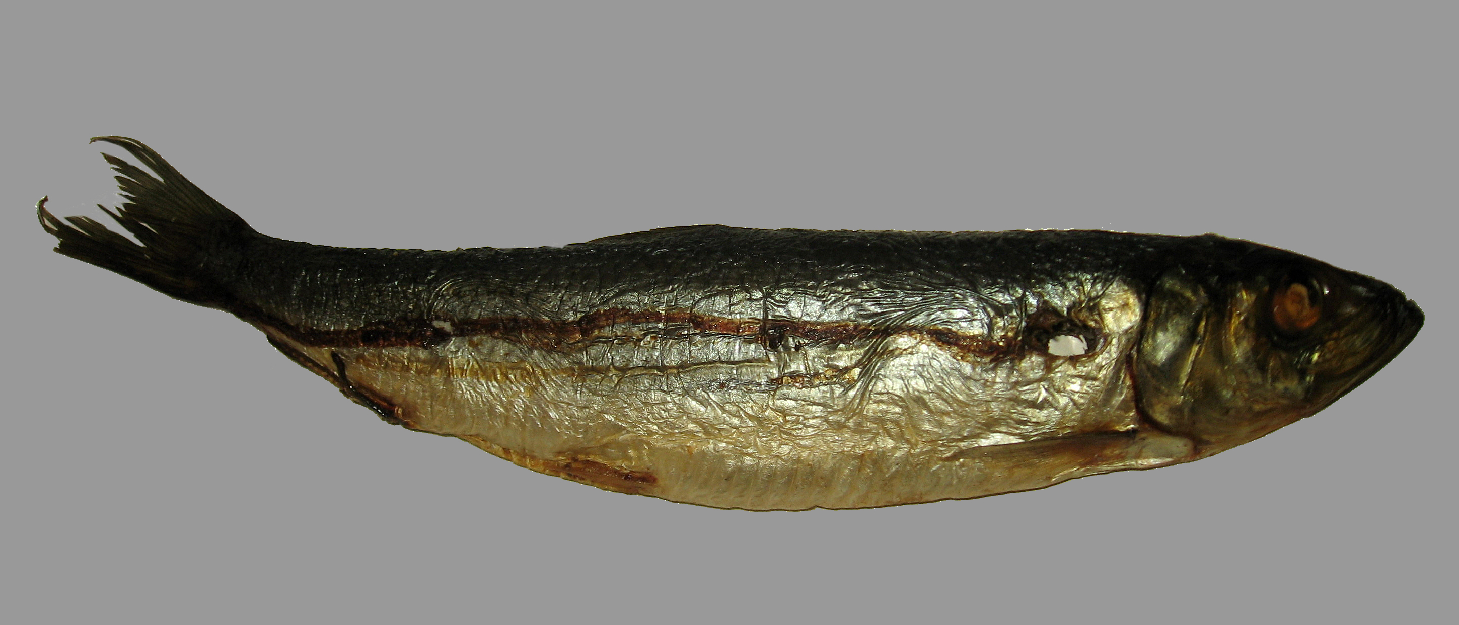 sleď obecný (uzený)